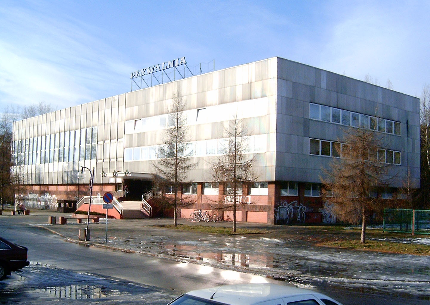 Kryta pływalnia w Kędzierzynie-Koźlu, woj. opolskie, Polska.